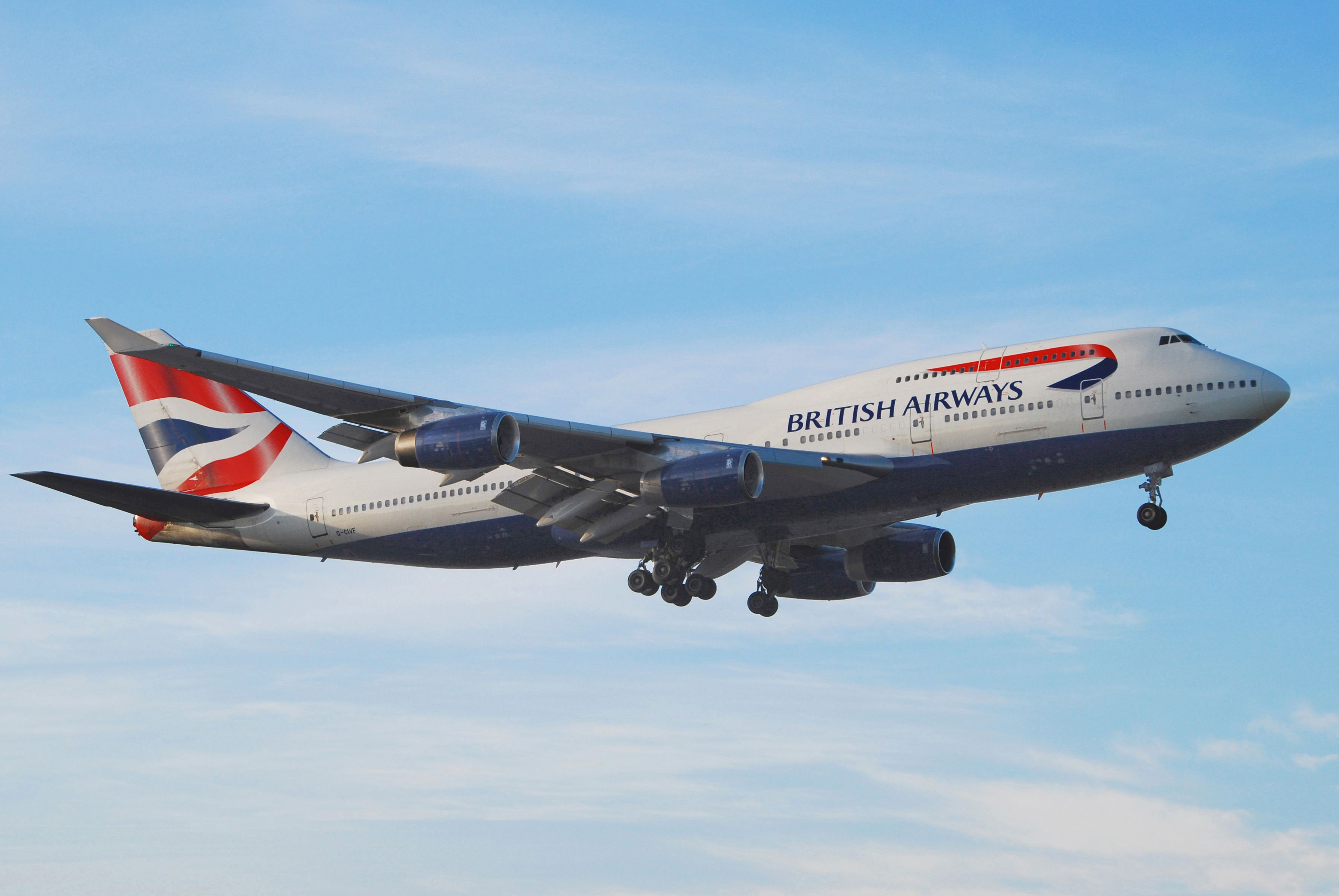 Spotting-03-0005